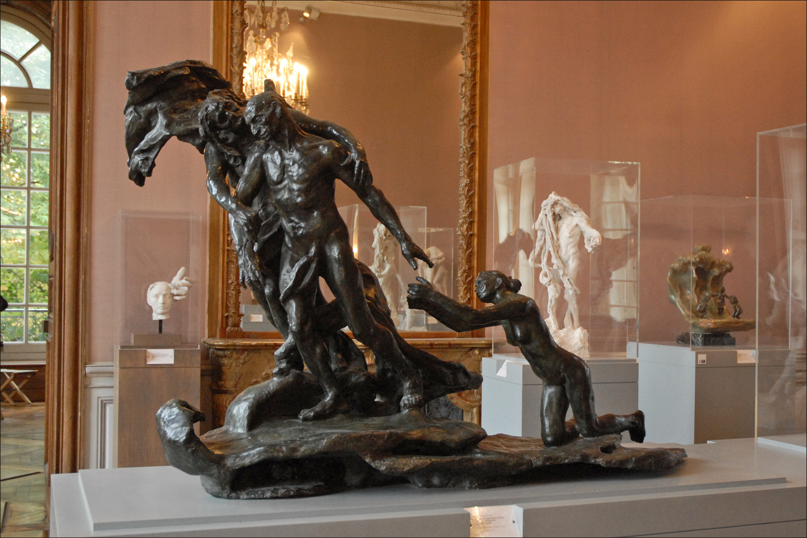 L'âge mur, deuxième version (The Age of Maturity, second version) 1899 Camille Claudel (1864-1943) Bronze, fonte Frédéric Carvilhani, vers 1913 1952 - Don Paul Claudel